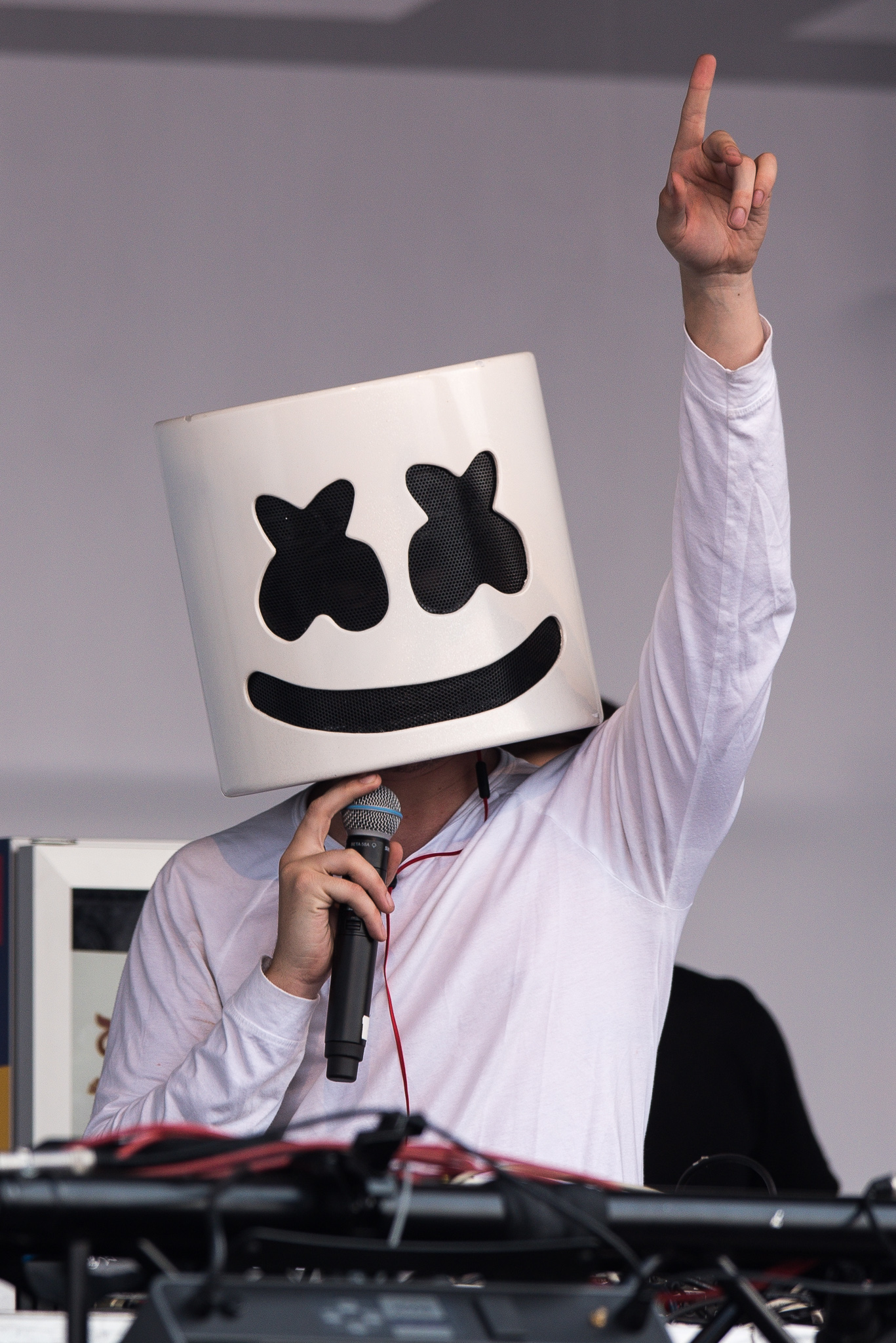 Festival,Konzert,Livekonzert,Livemusik,Mainstage,Marshmello,Musik,Open Beatz 2016